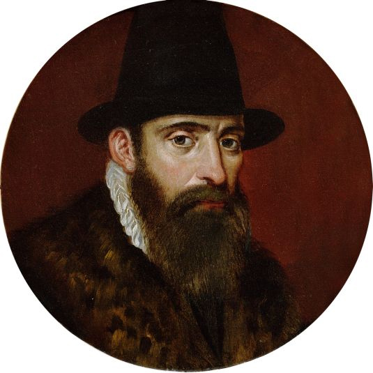 Jacob van Foreest (ca. 1533-1586) was de zoon van Jorden Jordensz van Foreest en Margriet Beyerszdr.